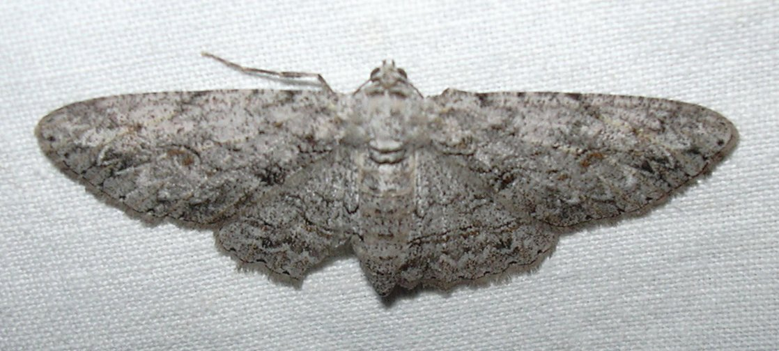 Anacamptodes fragilaria (Geometridae) from Hawai'i.